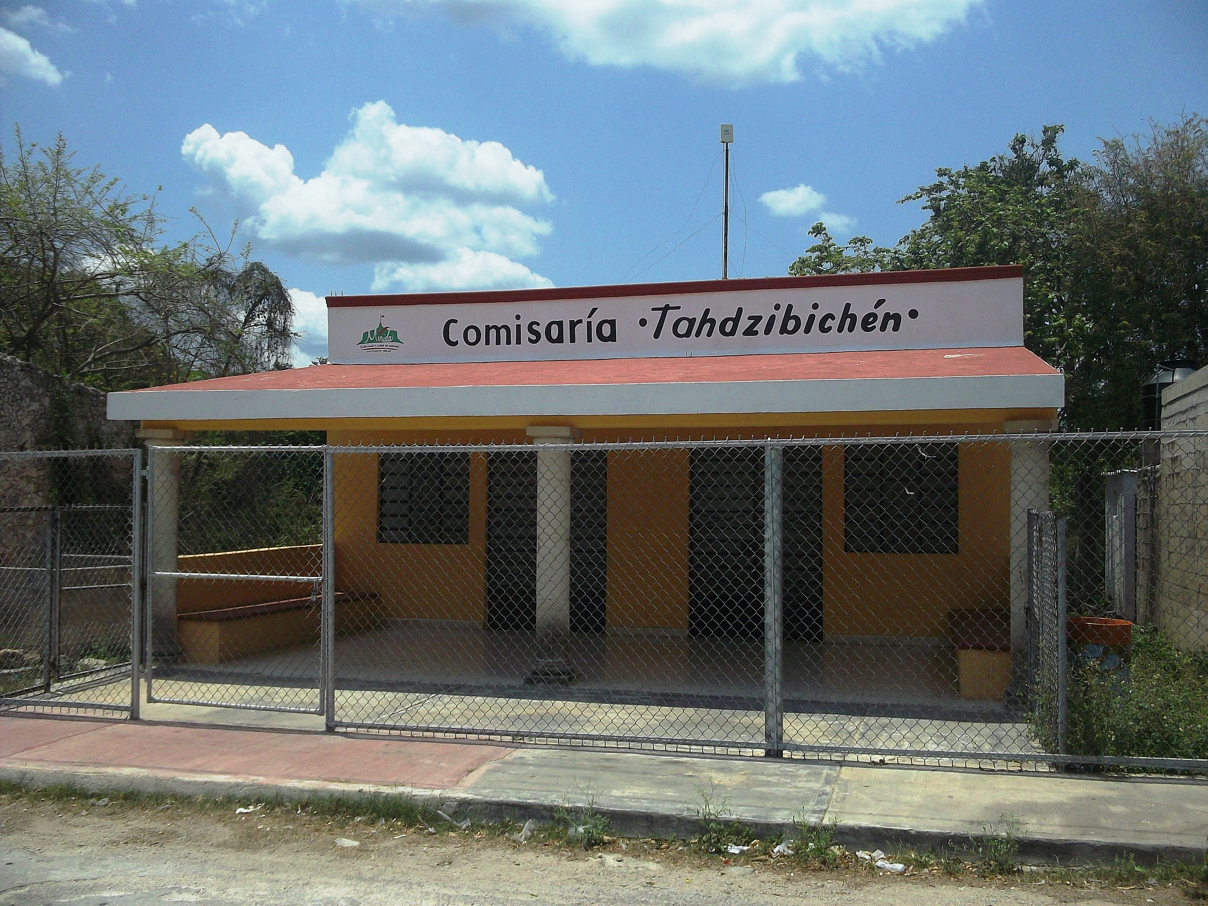 Casa comisarial de Tahdzibichén (Mérida), Yucatán.